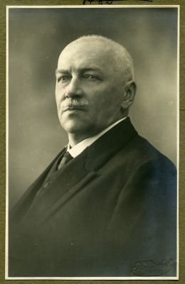 Georg Landesen